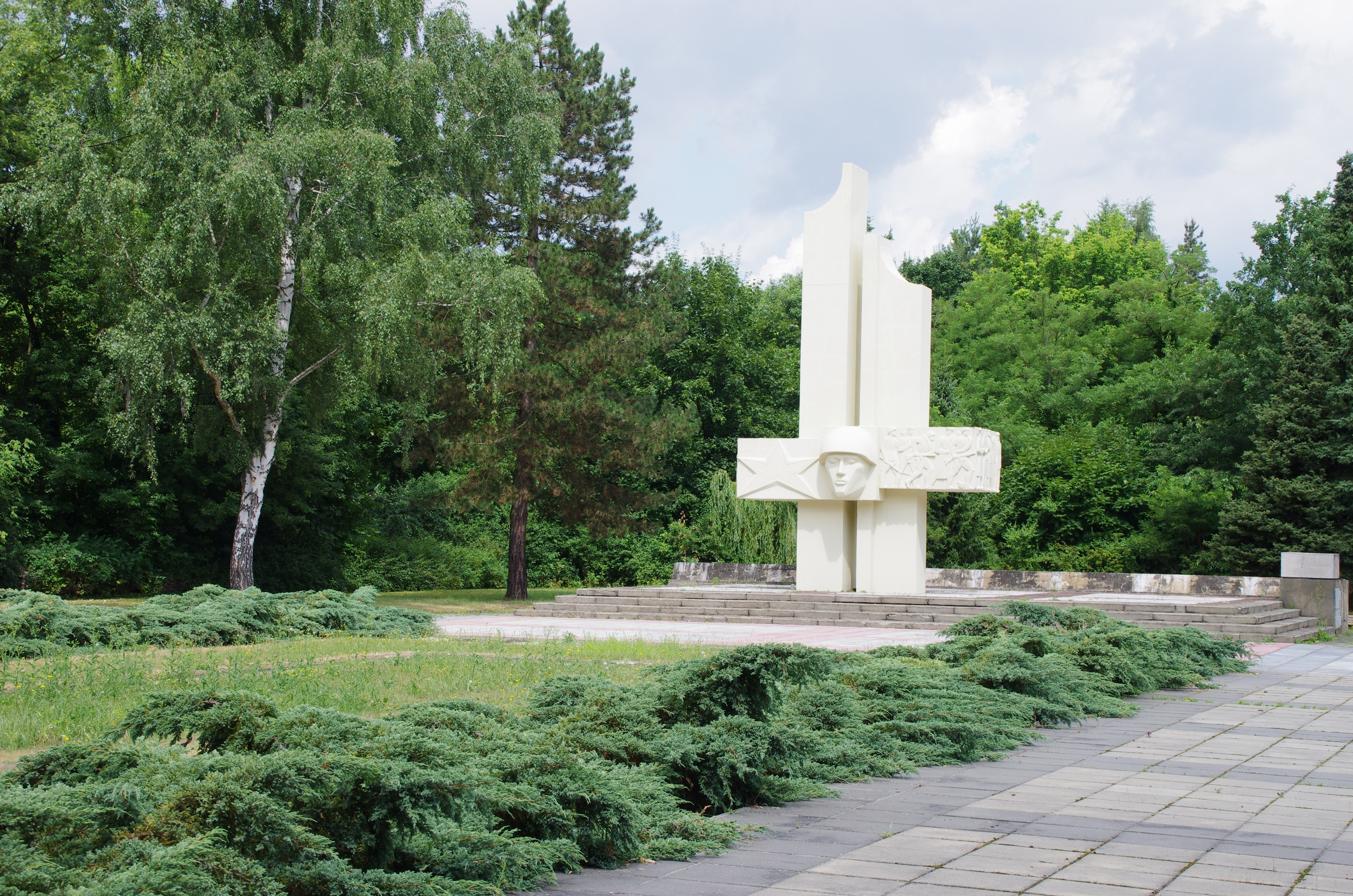 Lübben in Brandenburg. Das Sowjetische Ehrenmal in der Friedenstraße steht unter Denkmalschutz.